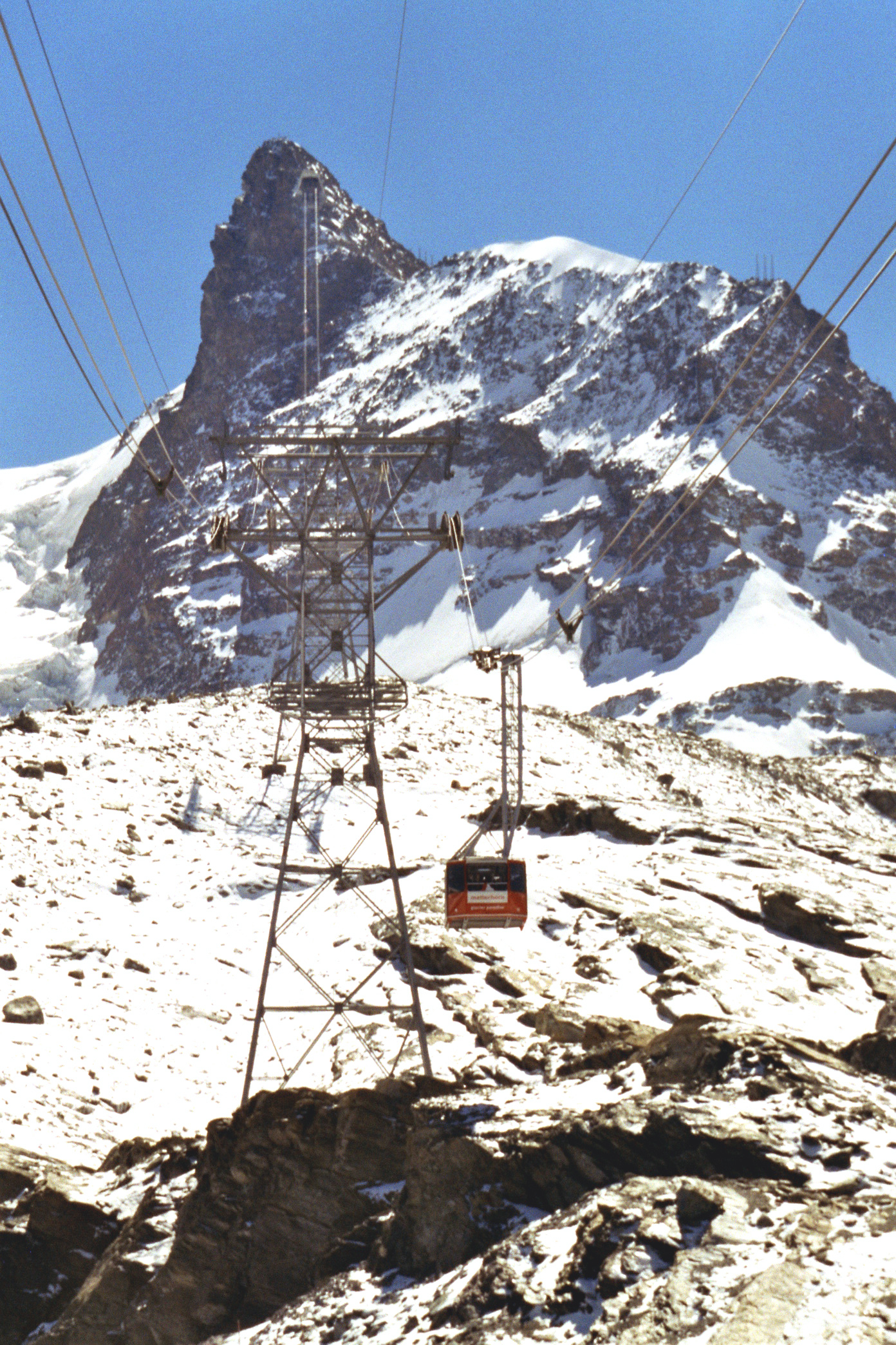 Seilbahn auf das Klein Matterhorn (3883 m.ü.M)